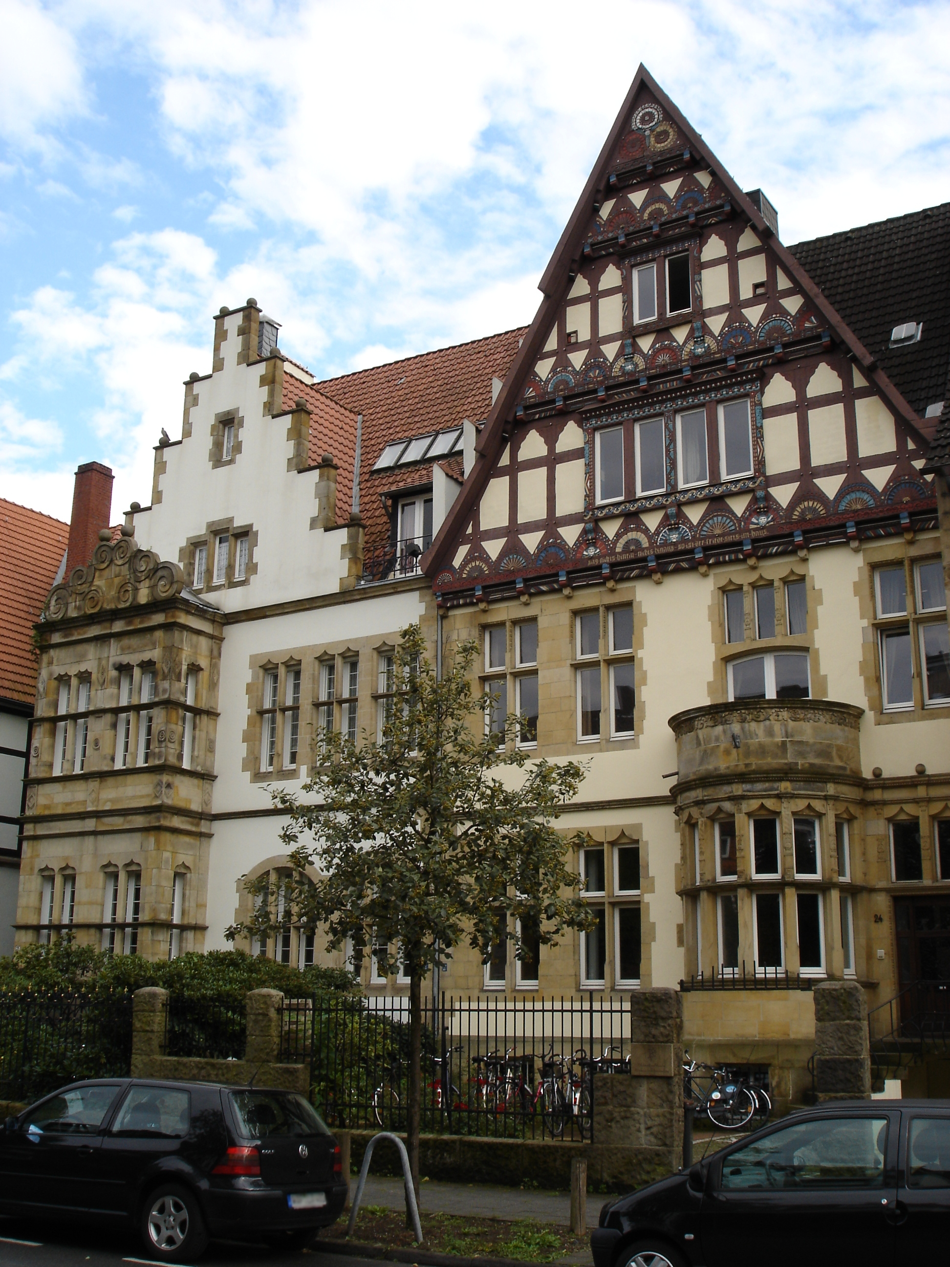 Building in the Burchardstraße, Erphoviertel in Münster, Westphalia, Germany